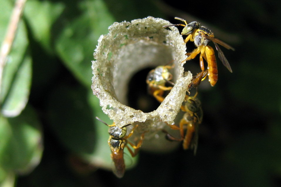 Abelha Jatai